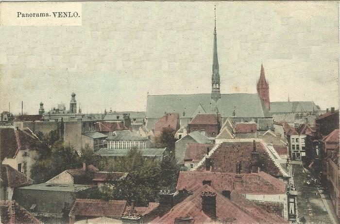 Venlo Nieuwstraat met oude Sint-Nicolaaskerk